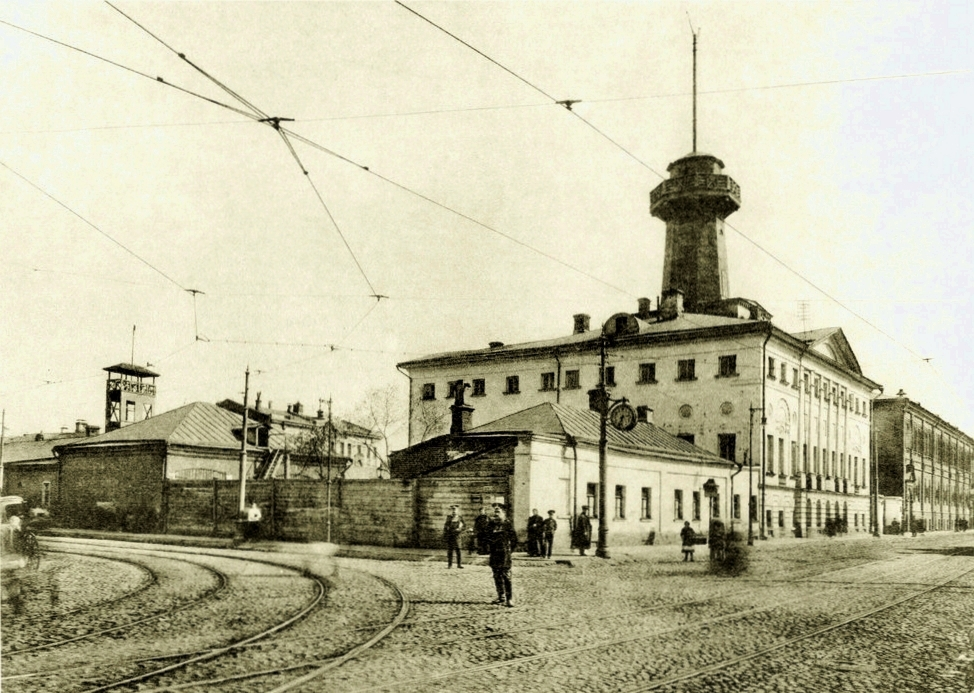 Casa di detenzione Pjatnickij, luogo in cui avvenne il 20 febbraio 1905 l'incontro tra la granduchessa Elizaveta Fëdorovna e Ivan Kaljaev